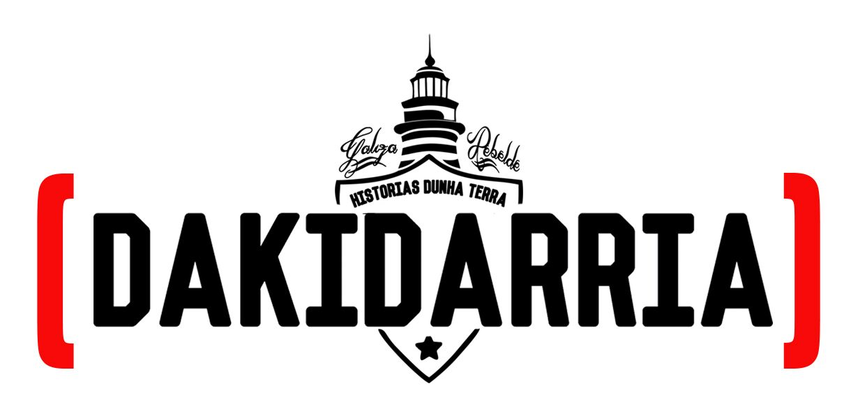 Logo Faro Dakidarría